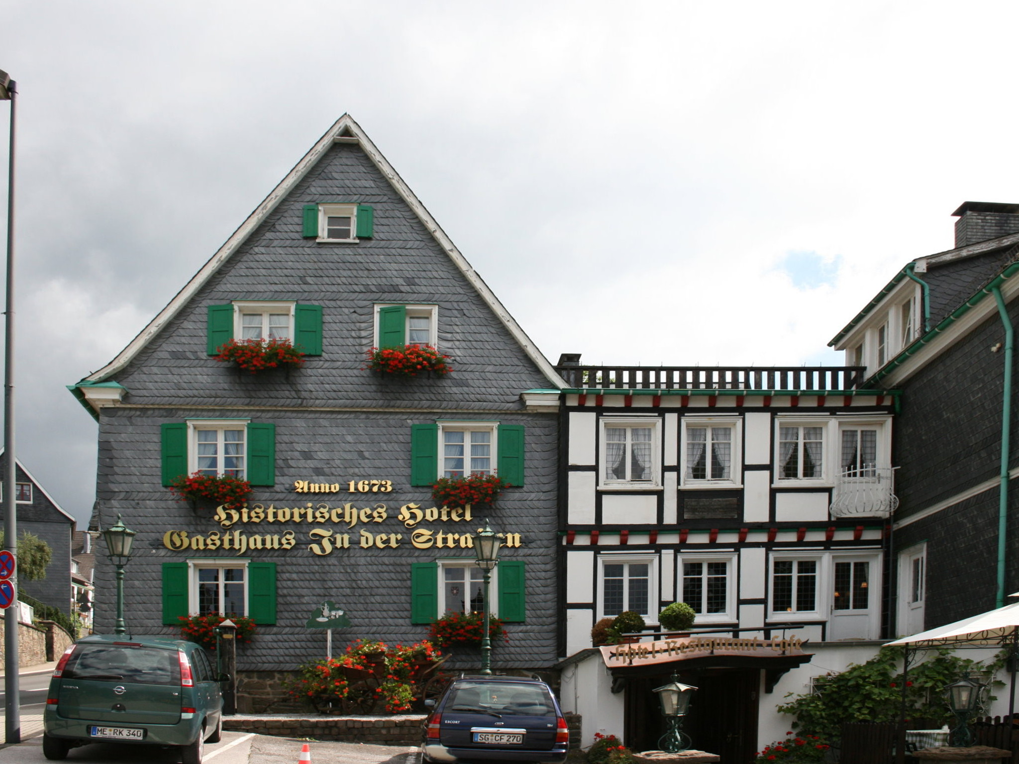 Historisches Gasthaus In der Straßen in Solingen-Burg (Oberburg)